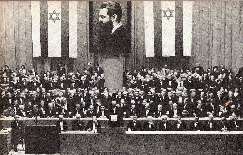 הקונגרס הציוני ה-21 בז'נבה בשנת 1939